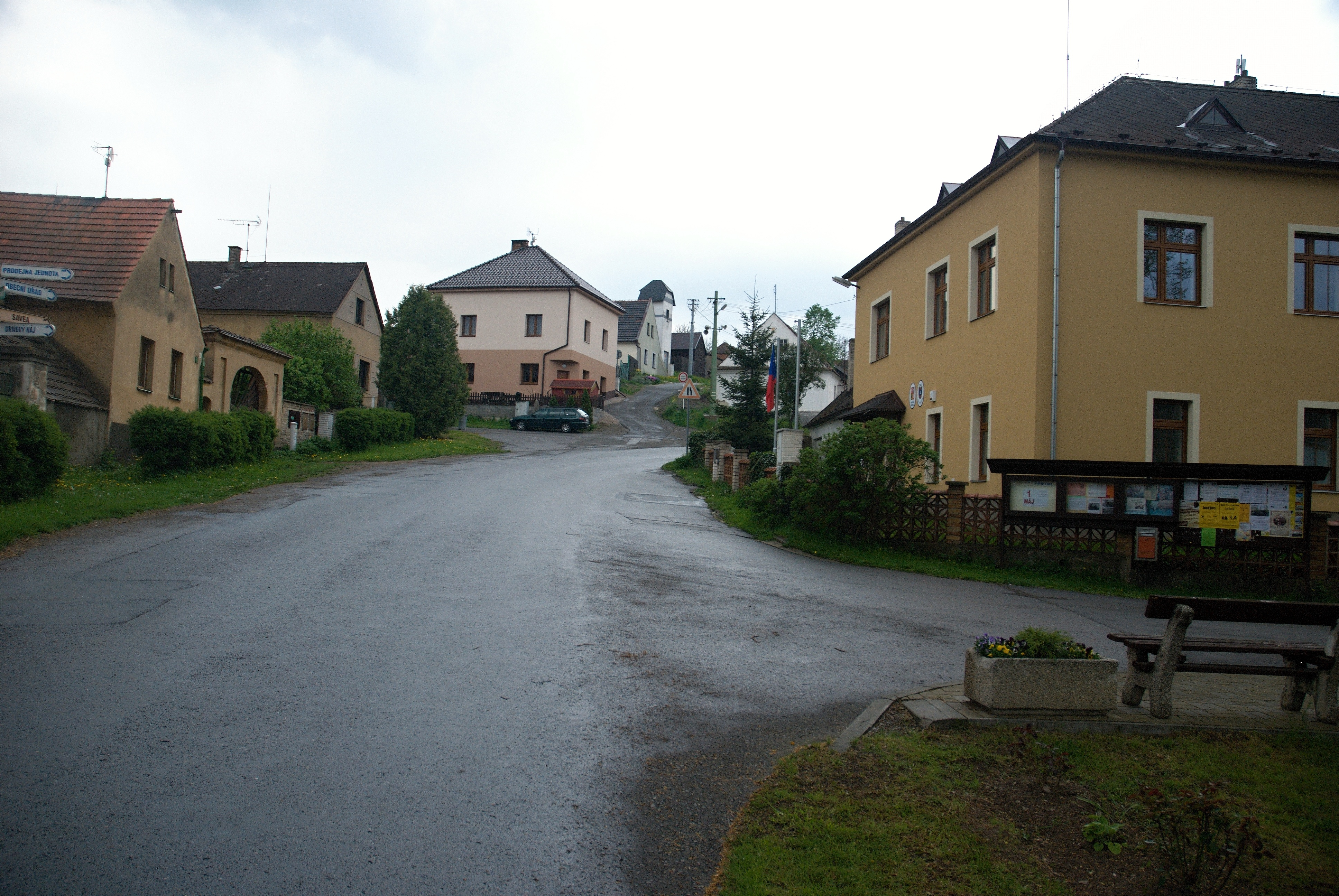 obecní úřad